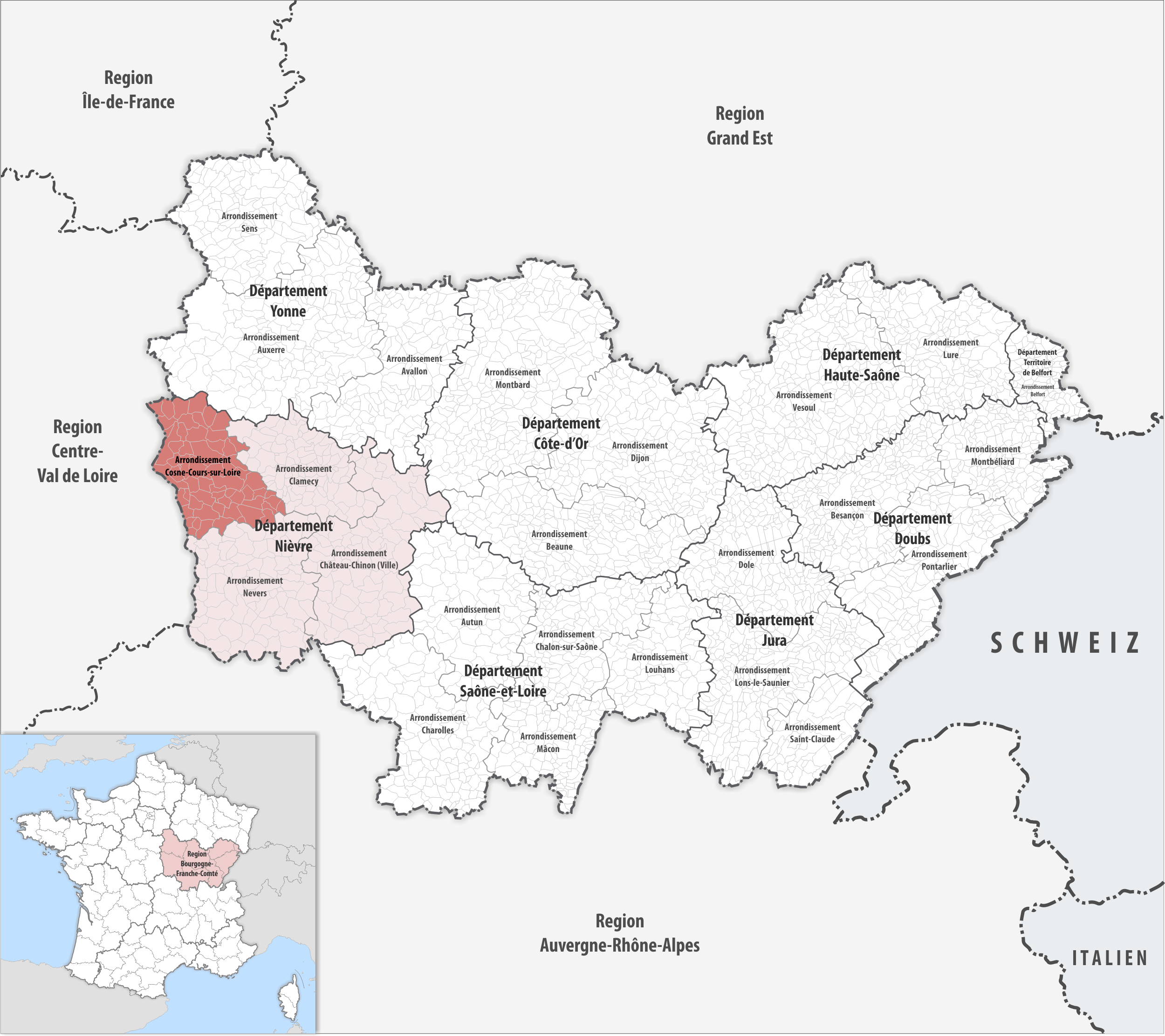 Lage des Arrondissements Cosne-Cours-sur-Loire